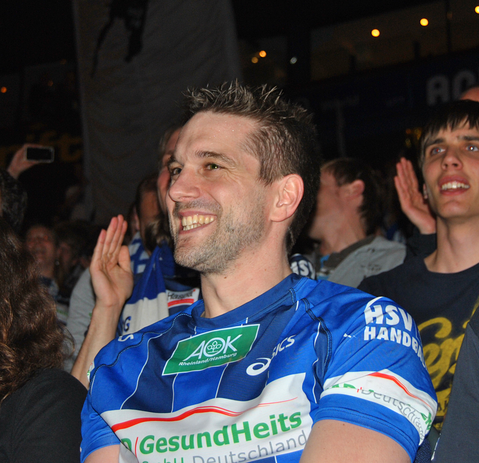 Guillaume Gille wurde bei seinem letzten Heimspiel für den HSV Handball verabschiedet.